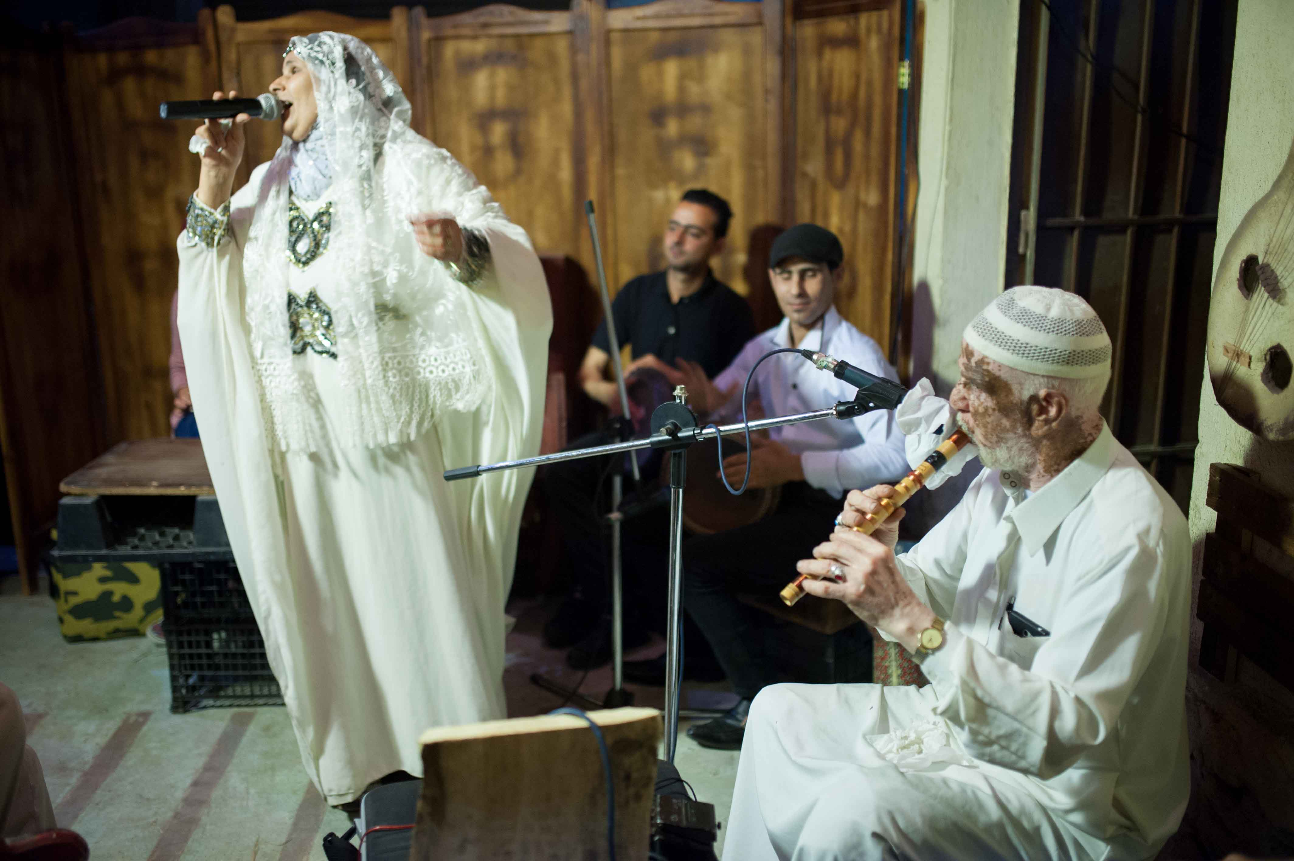 المغنية الشعبية الحاجه شادية بمصاحبة فرقة عزف على السمسمية This is an image of music and dance from Egypt